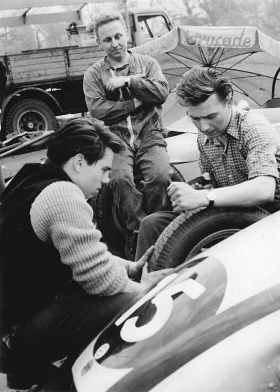 Zentralbild Kohls 23.4.1961 Auf der Halle-Saale-Schleife dröhnen die Motoren Am 23.4.1961 erfolgt um 10.00 Uhr der Start zum Internationalen Rennen auf der Halle-Saale-Schleife. Bereits in den frühen Morgenstunden des 22.4.61 trainierten die Fahrer und machten sich so mit dem Kurs vertraut. UBz. Kurt Ahrens jun. (Braunschweig) (Mitte) lässt sich von Monteuren die Reifen seines Cooper-Stanguell aufrauhen.